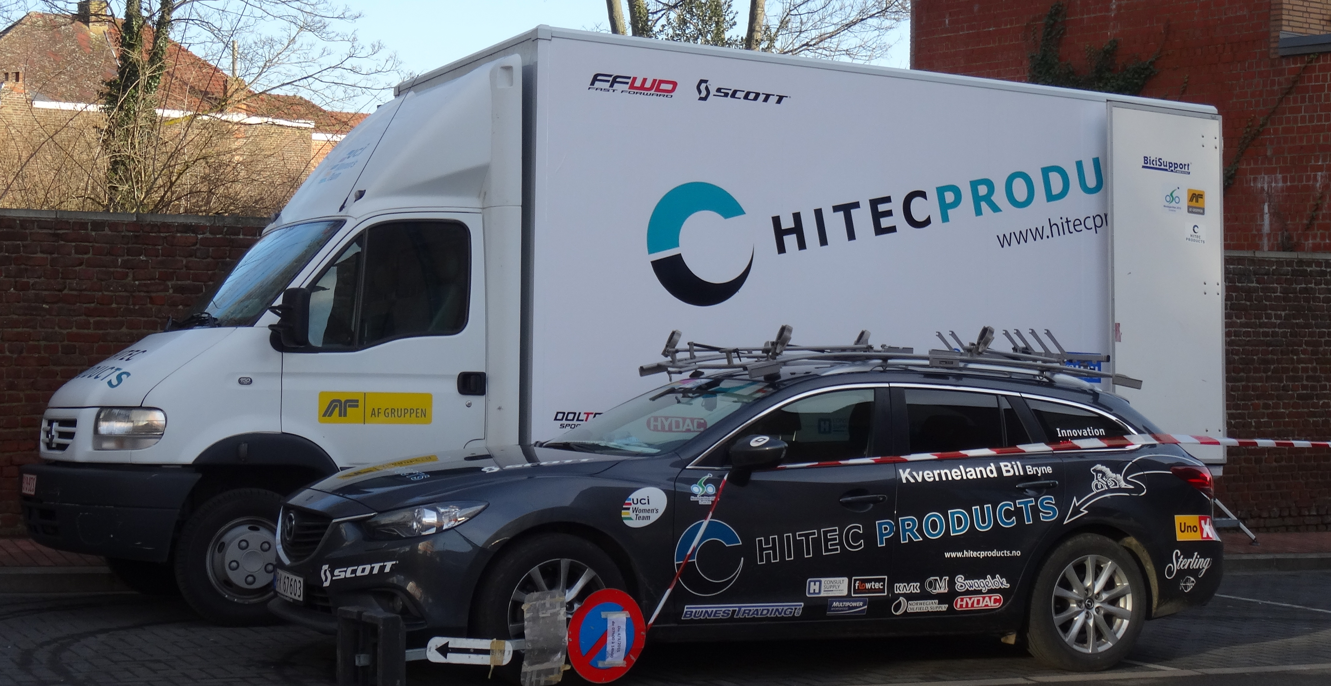 Reportage réalisé le mercredi 4 mars à l'occasion du départ du Samyn des Dames 2015 et du Samyn 2015 à Quaregnon, Belgique.